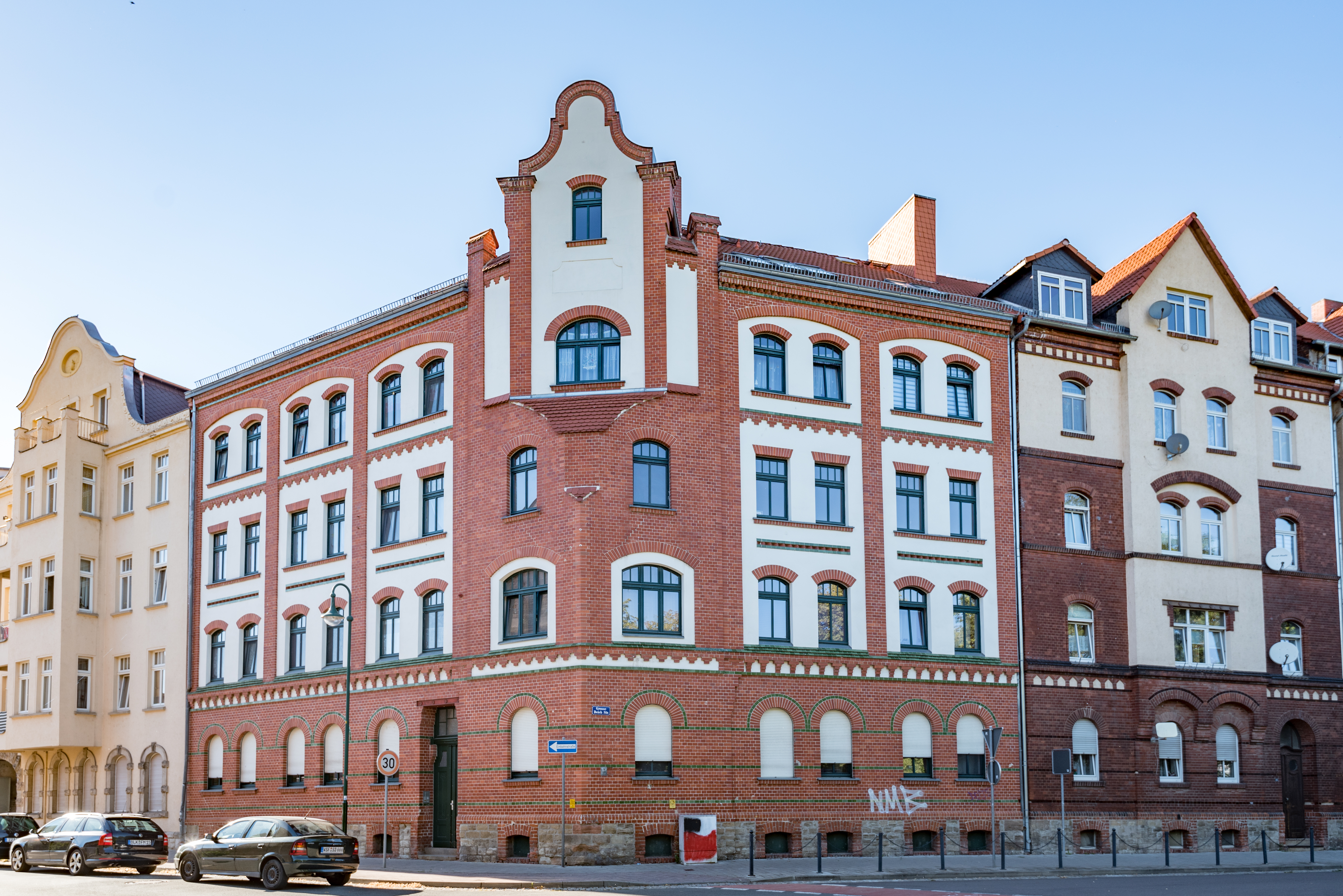 Weißenfels, Leopold-Kell-Straße 55